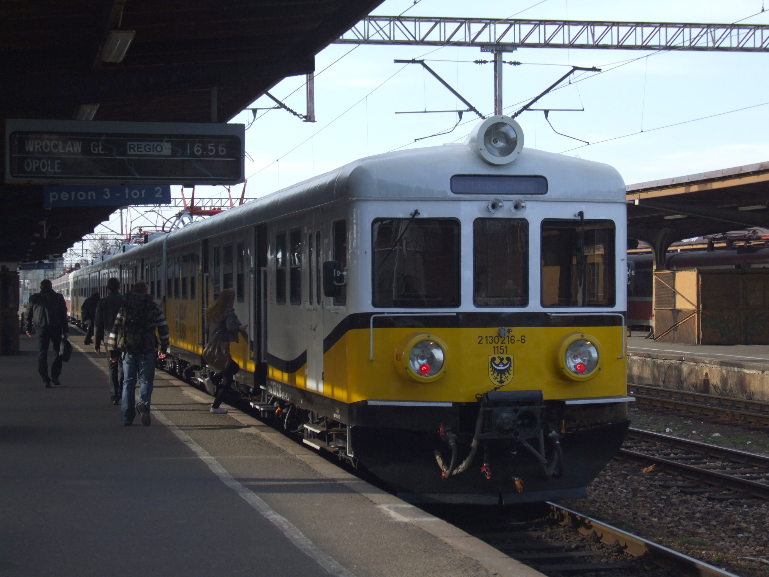 Zmodernizowany EN57 Przewozów Regionalnych w nietypowych barwach woj. dolnośląskiego. Zwraca uwagę numer międzynarodowy NVR na czele pociągu